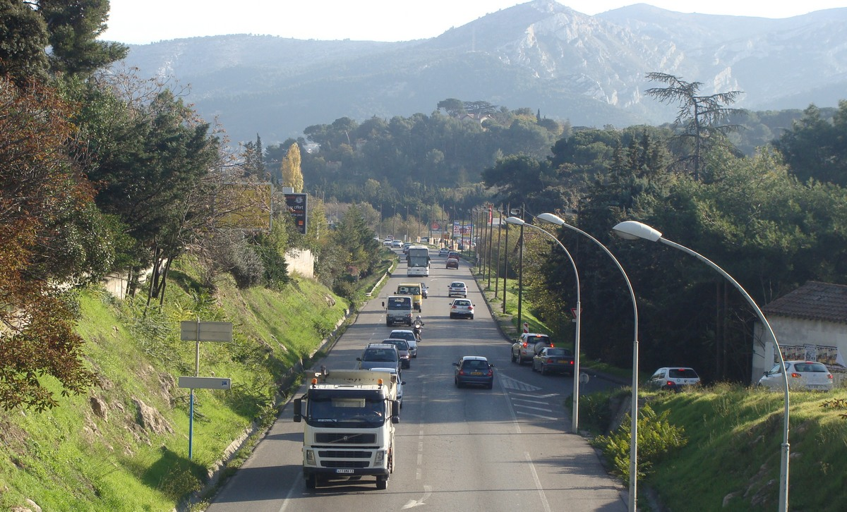 L'avenue des Peintres Roux, qui descend des Trois-Lucs vers la Valentine (vue depuis le pont de l'avenue des Trois-Lucs).